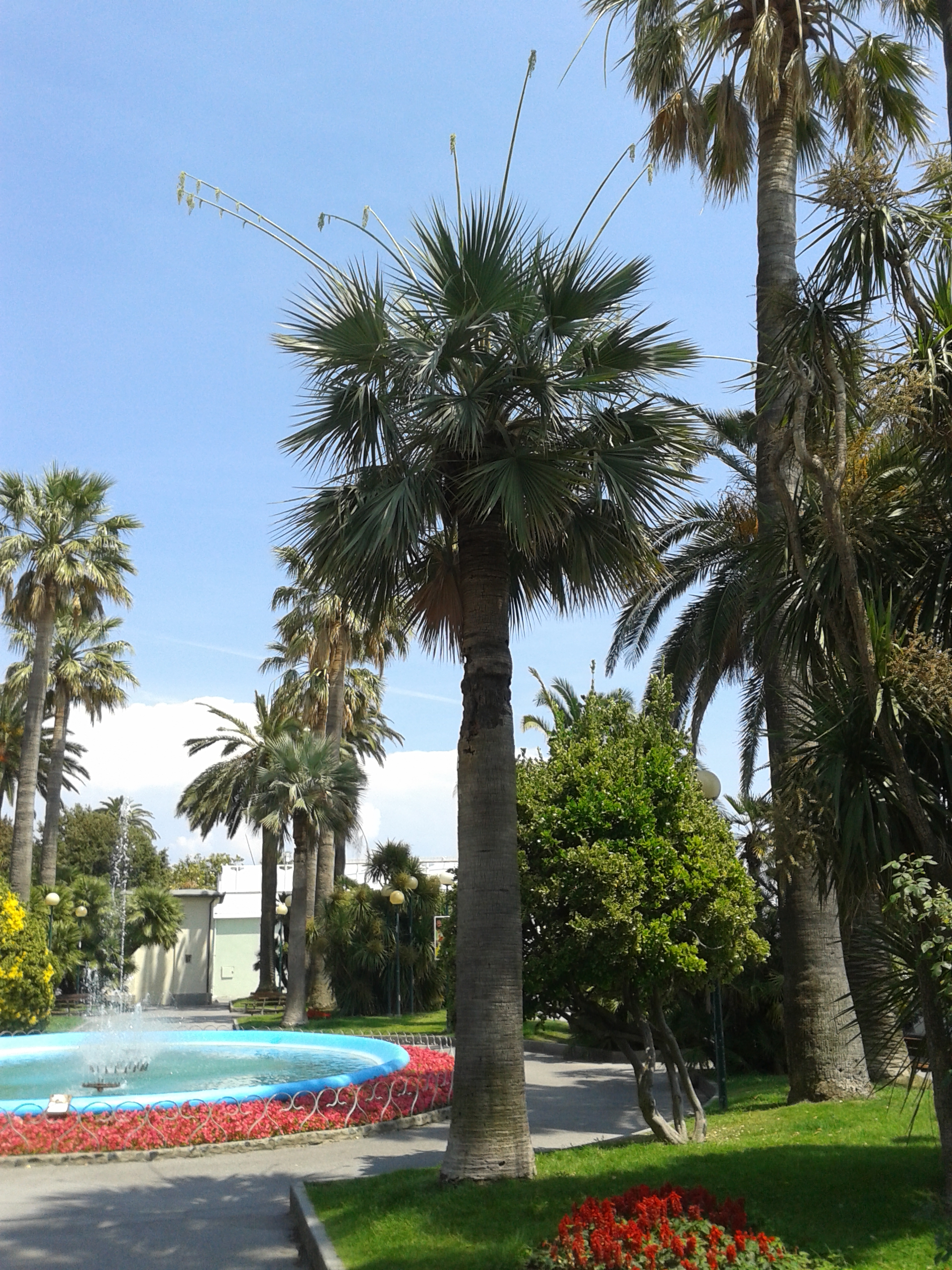 Brahea armata, Varazze, 2014